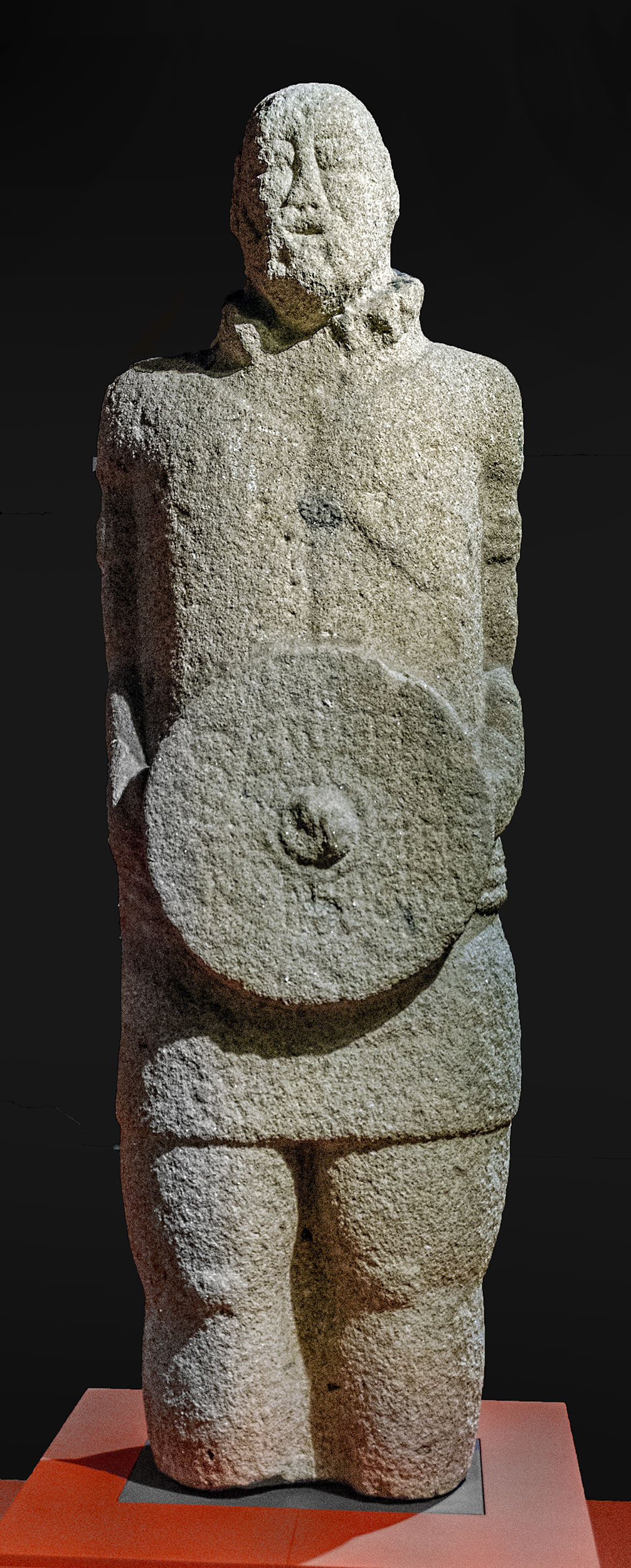 Se encontró en 1785 en el castro de Lesenho, en Vila Real, Portugal. Datado en el siglo I es una estatua de más de 2 m tallada en granito que representa un guerrero con escudo y puñal, además de torque y brazaletes. Cedido por el Museo Arqueológico Nacional de Portugal, se muestra como parte de una exposición temporal en el MAN, Madrid.